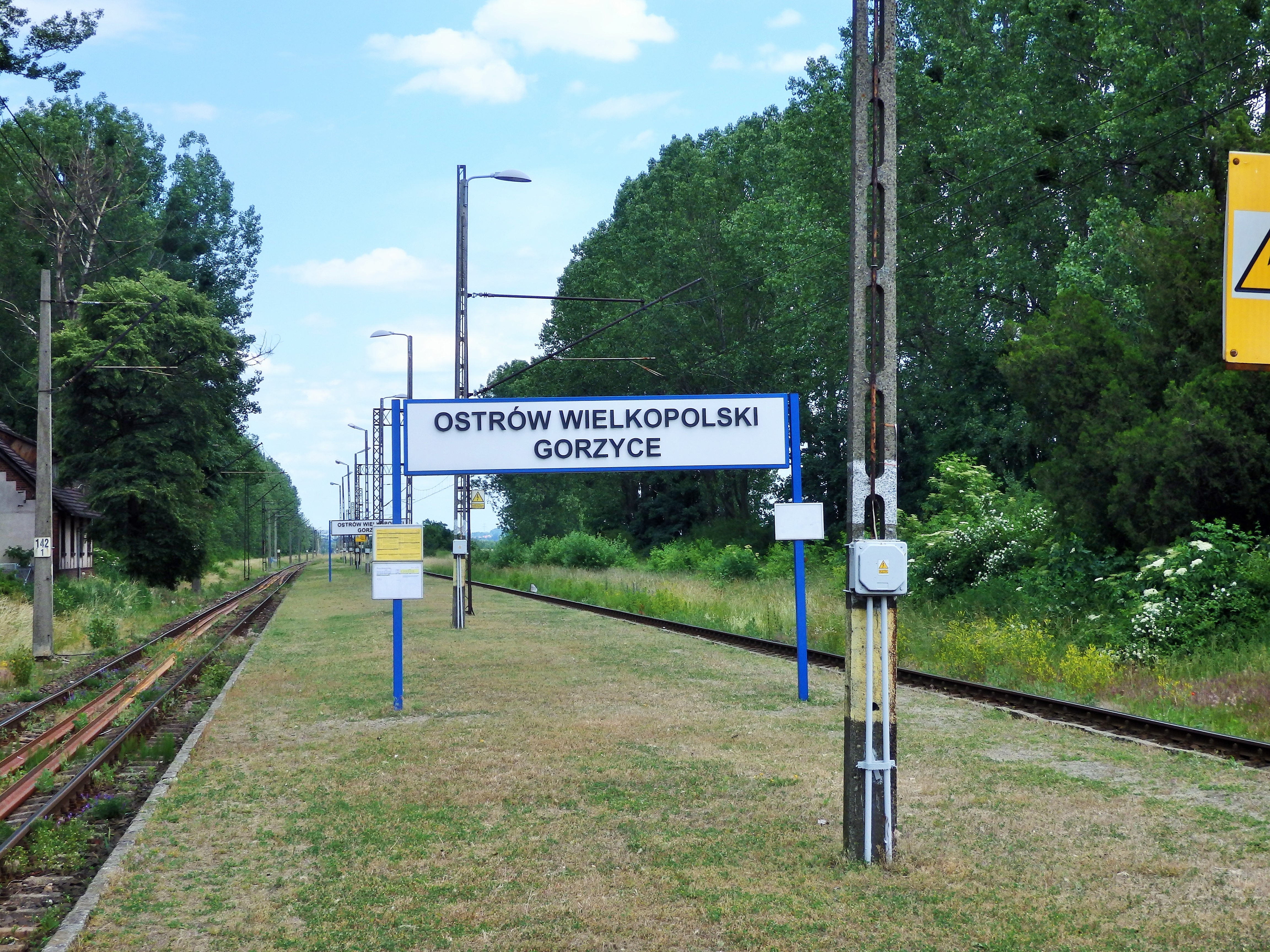 Stacja kolejowa Ostrów wlkp - Gorzyce